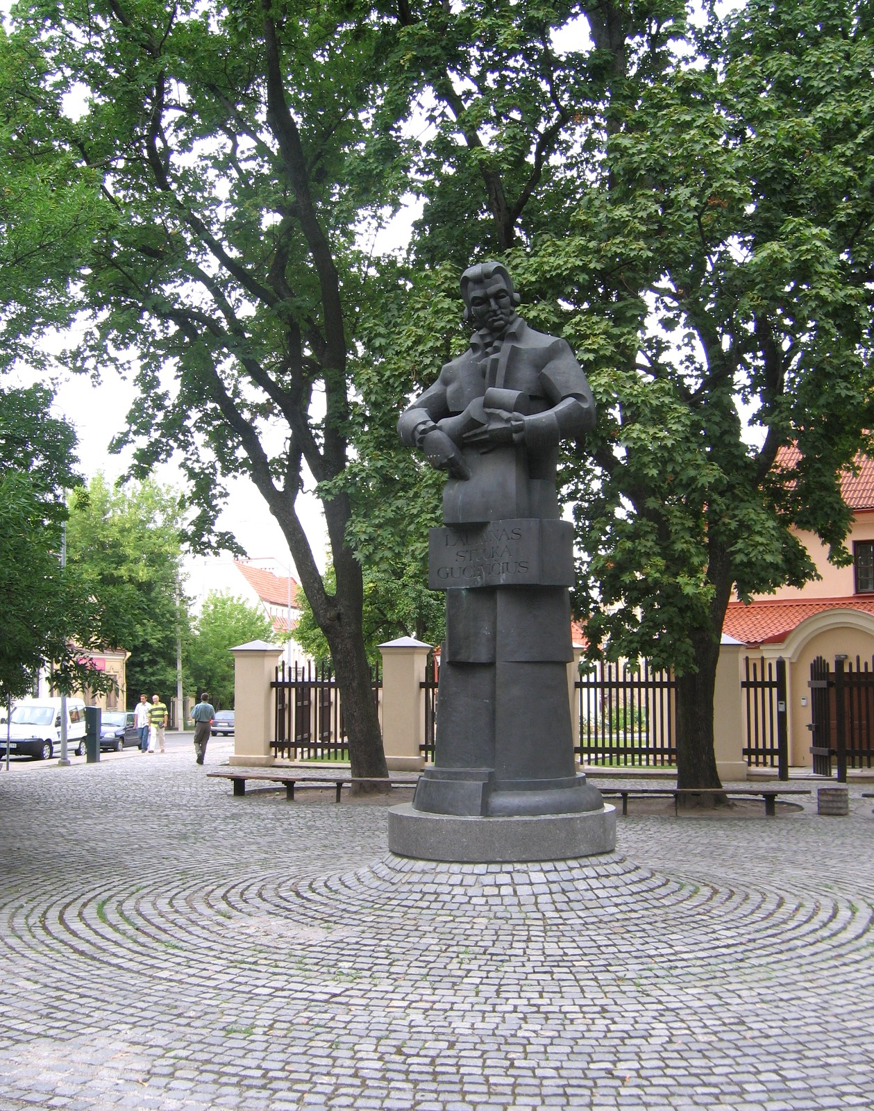 Autoriaus nuotrauka. 2006.07.29. L. Gucevičiaus paminklas, Vilnius, S. Daukanto a.